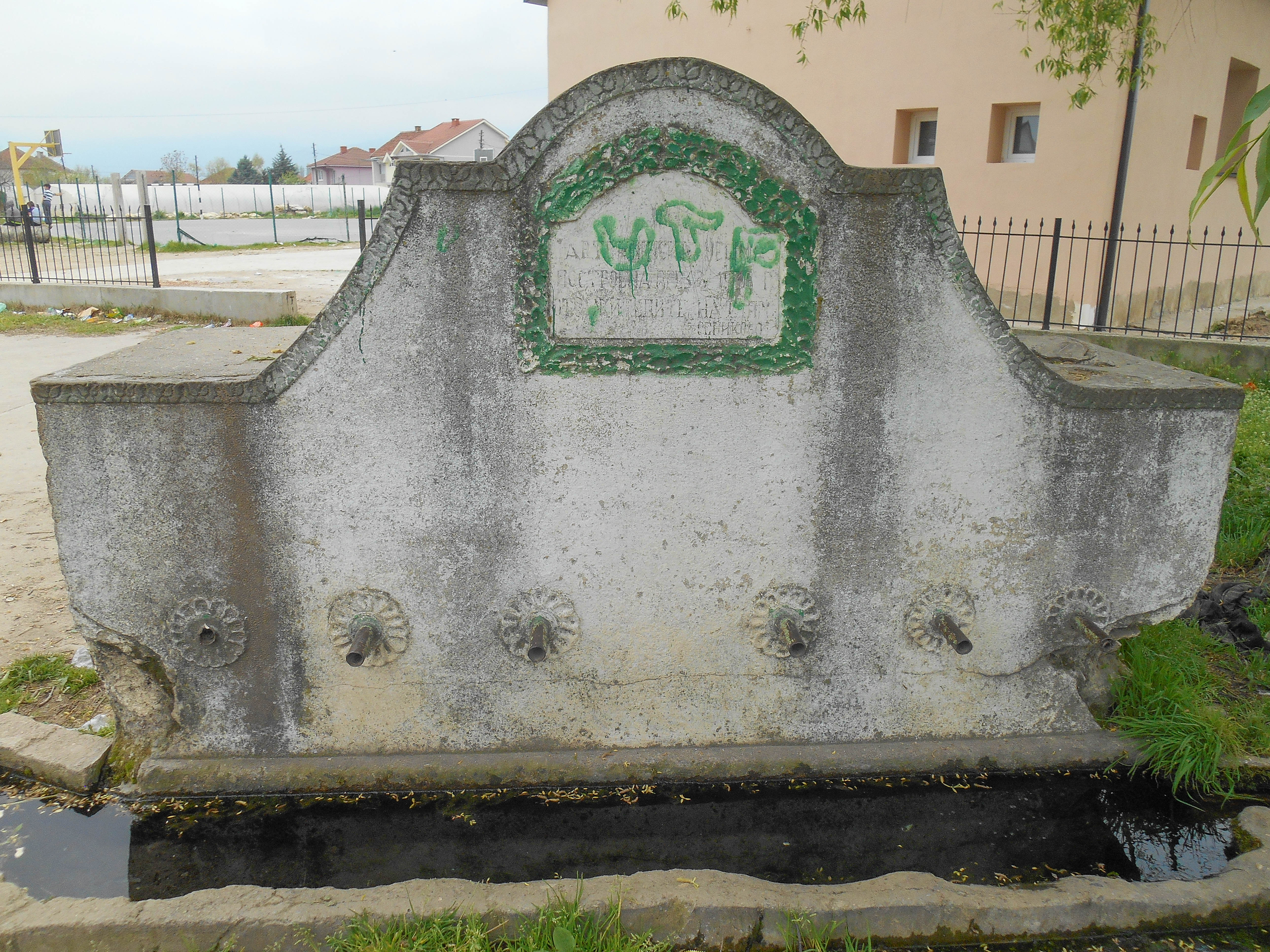 Селска чешма